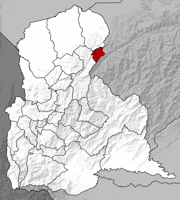 Municipio Simón Rodríguez - Táchira